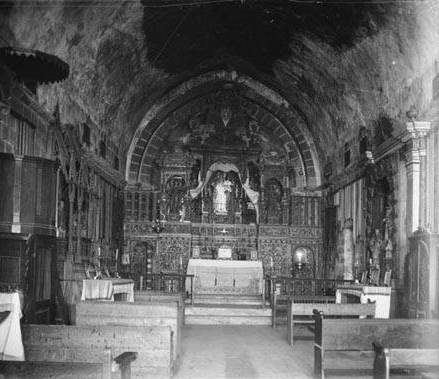 Imatge